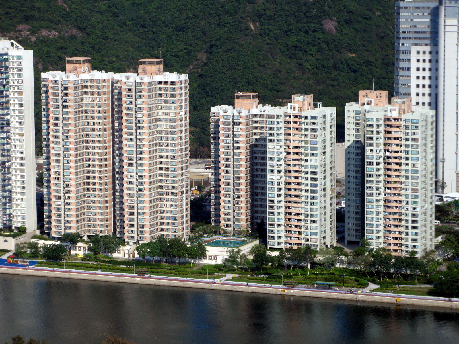 HK Shatin Garden Vista 翠湖花園